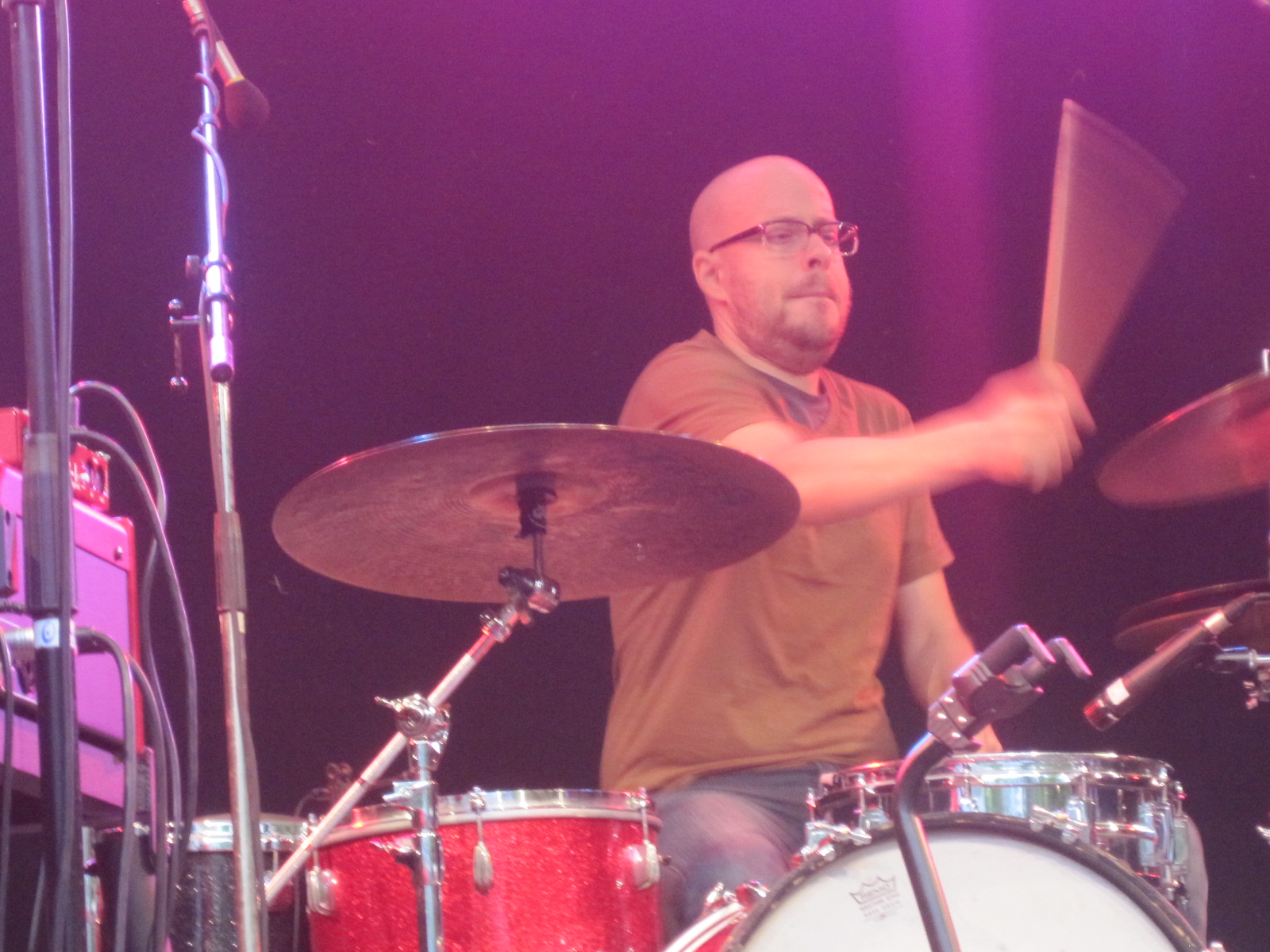 Sebastian Merk, german jazz drummer